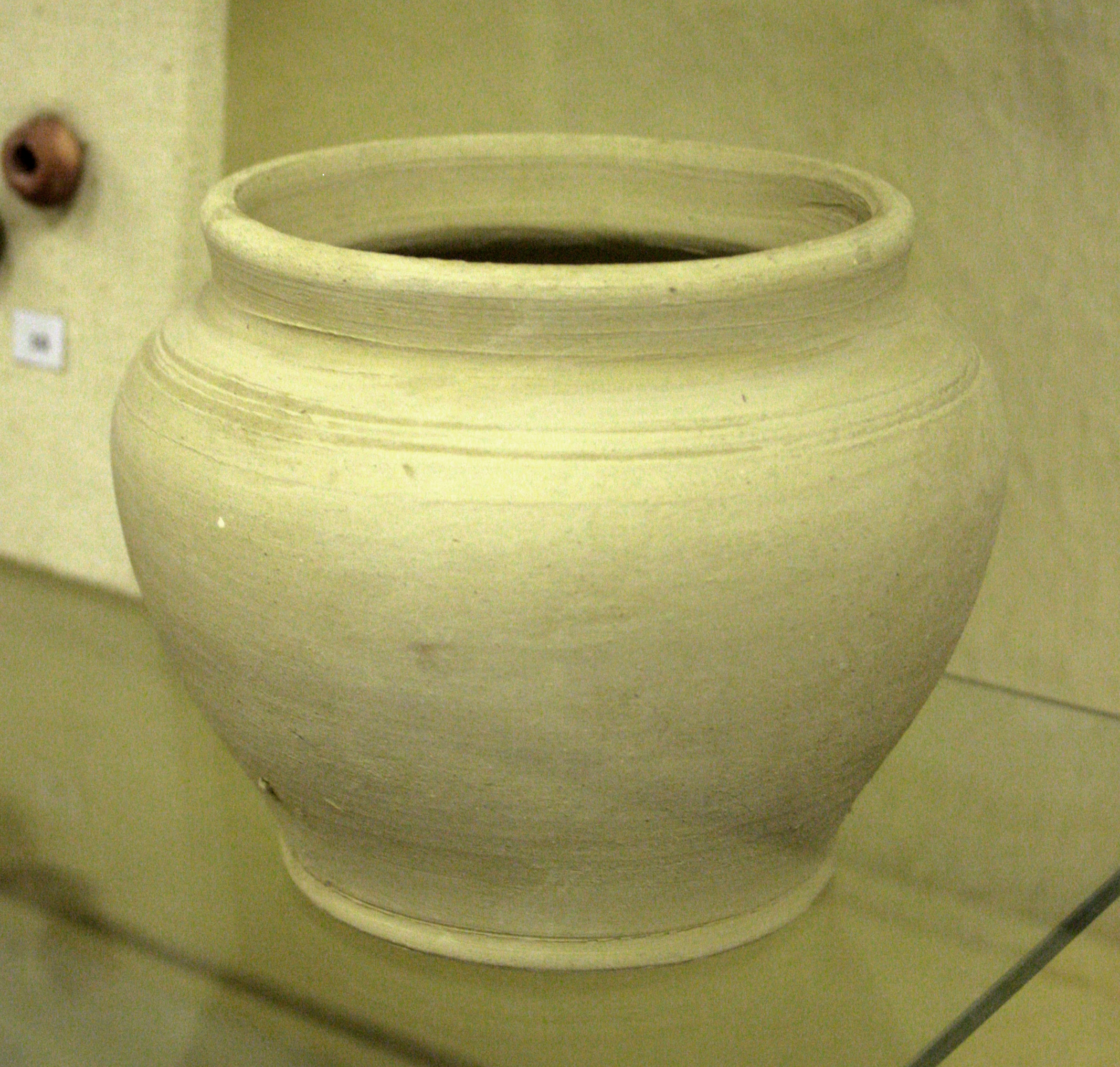 Горшок (муляж), Крапивенского городища. Древнерусская культура, X–XIII века. Из фондов Шебекинского историко-художественном музея.